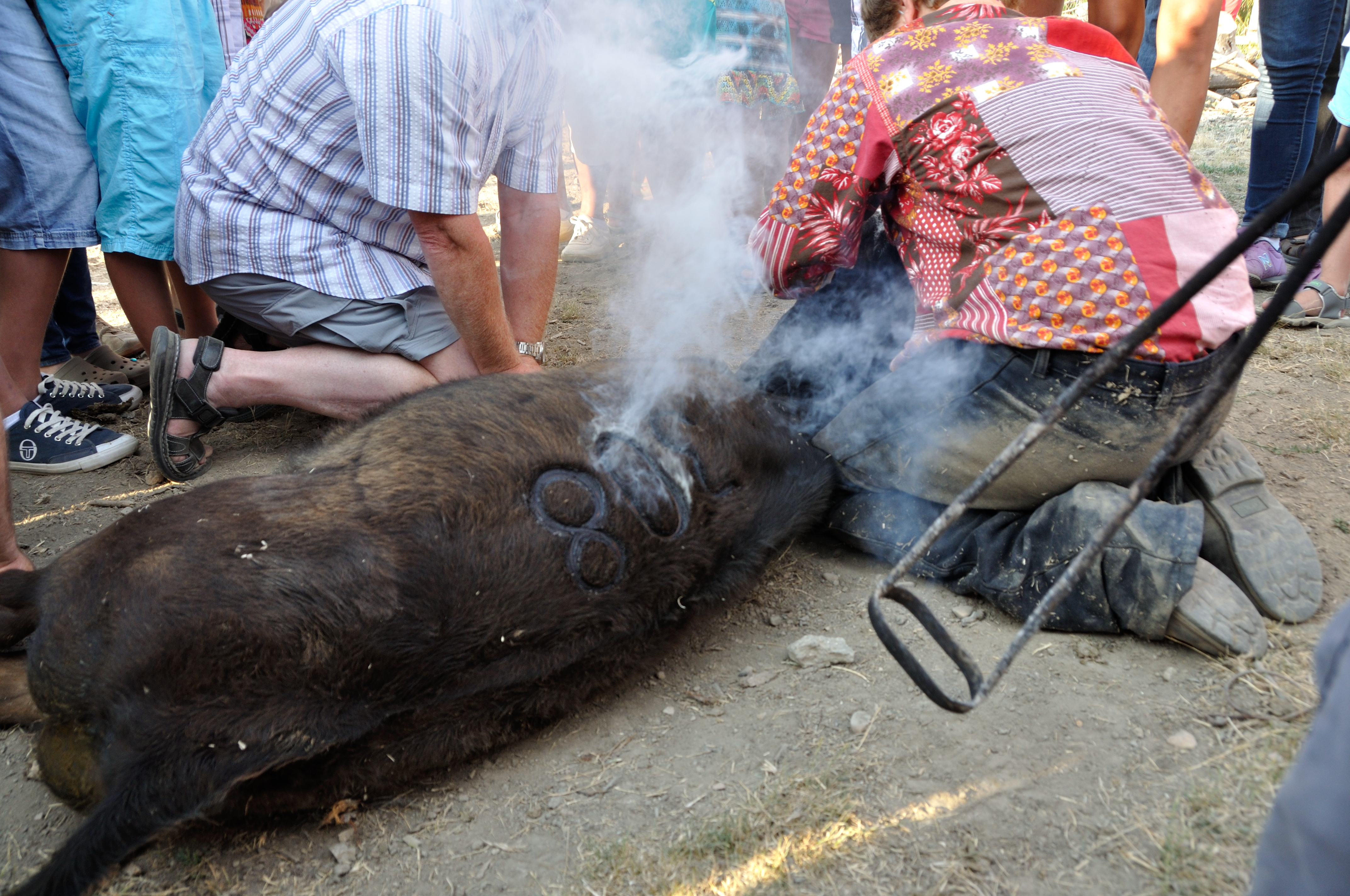 Marquage au fer (ferrade) d'un jeune taureau de Camargue à la manade Martini.